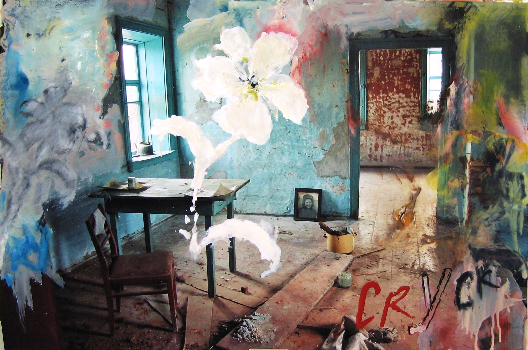 Художник Игорь Тишин. "Кризис в Раю"-3, 2009, 50,5x75 см, фотопринт, масло.